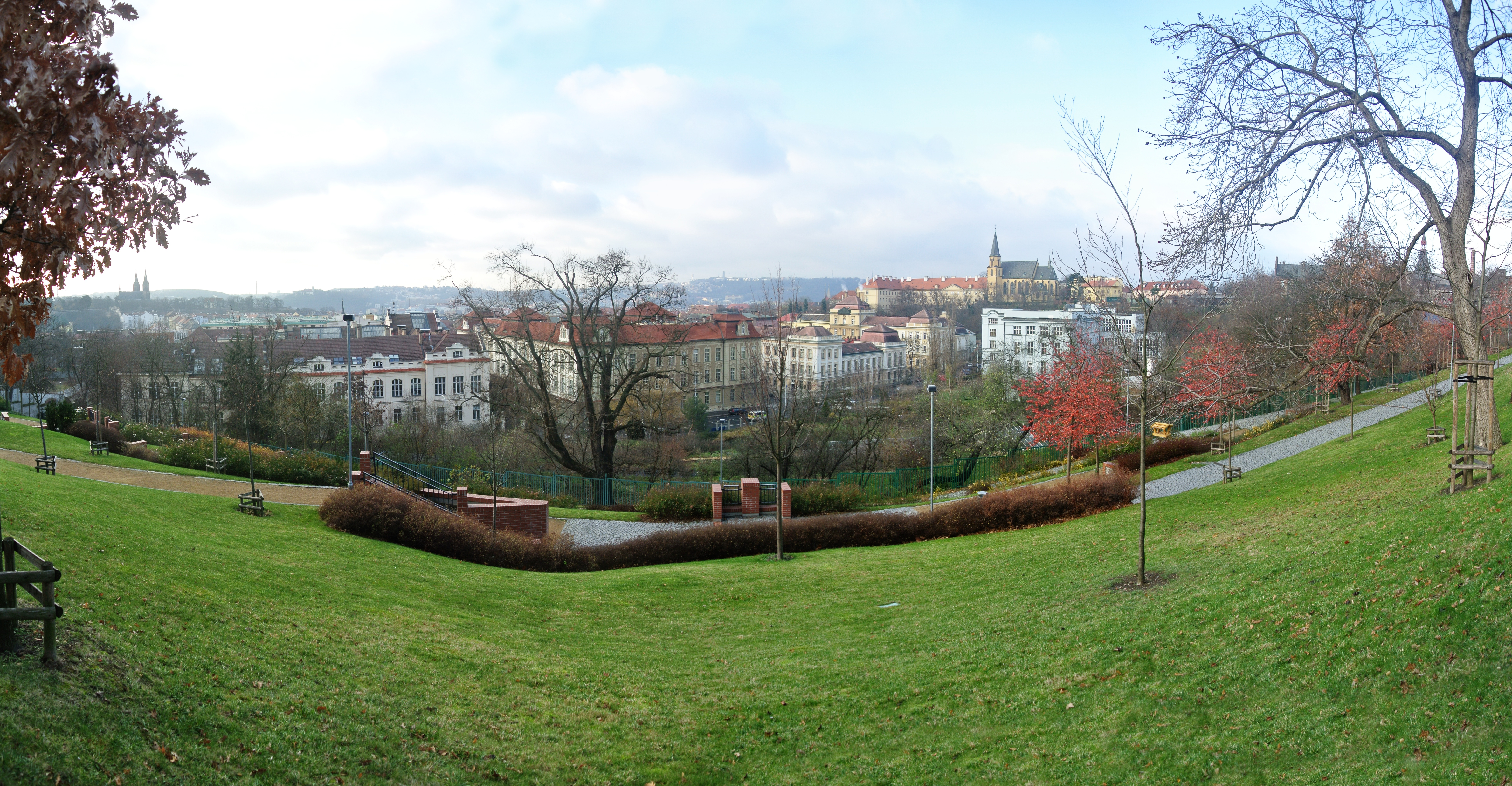 Praha-Albertov